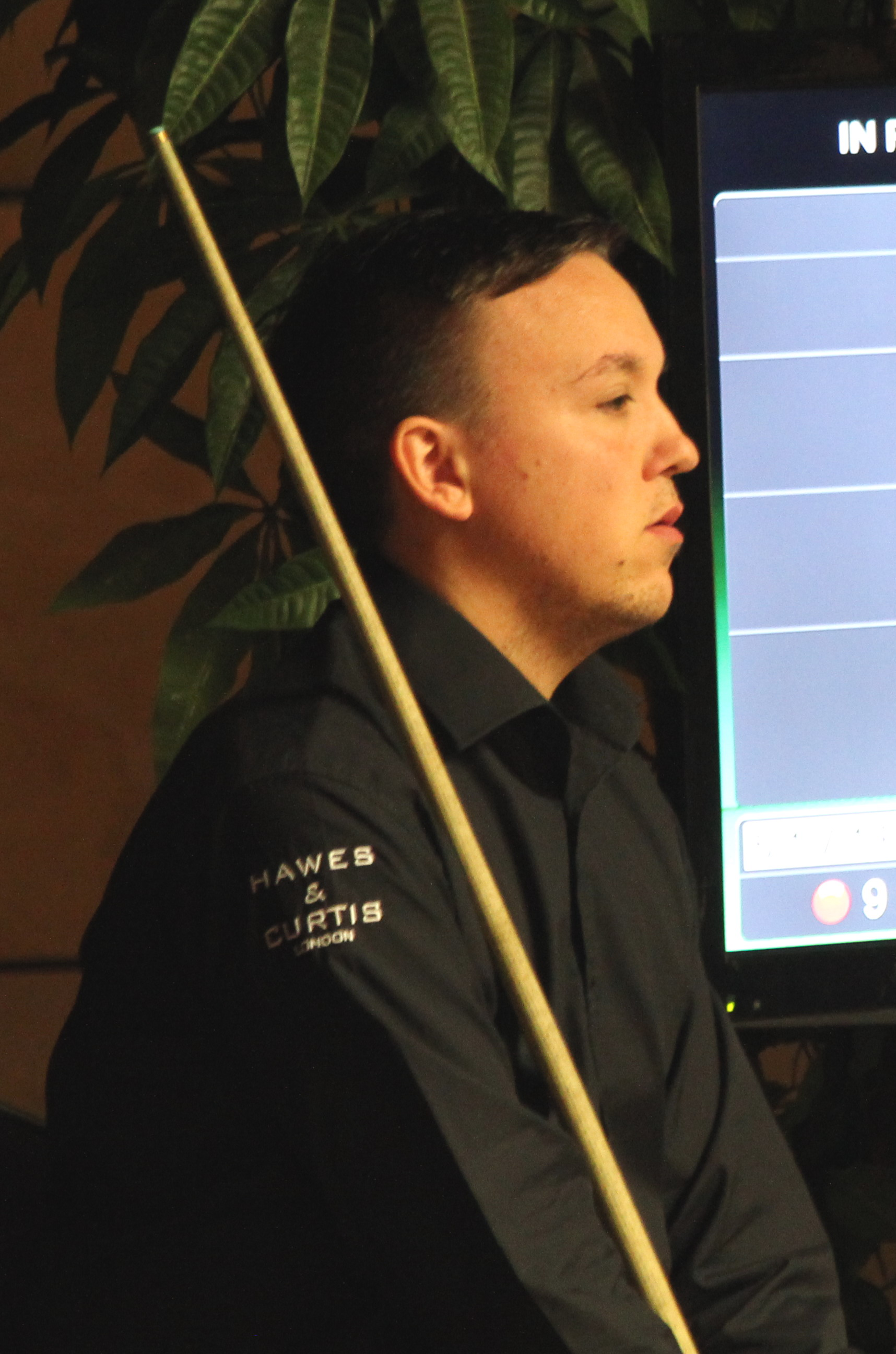 Lee Page beim Paul Hunter Classic 2014